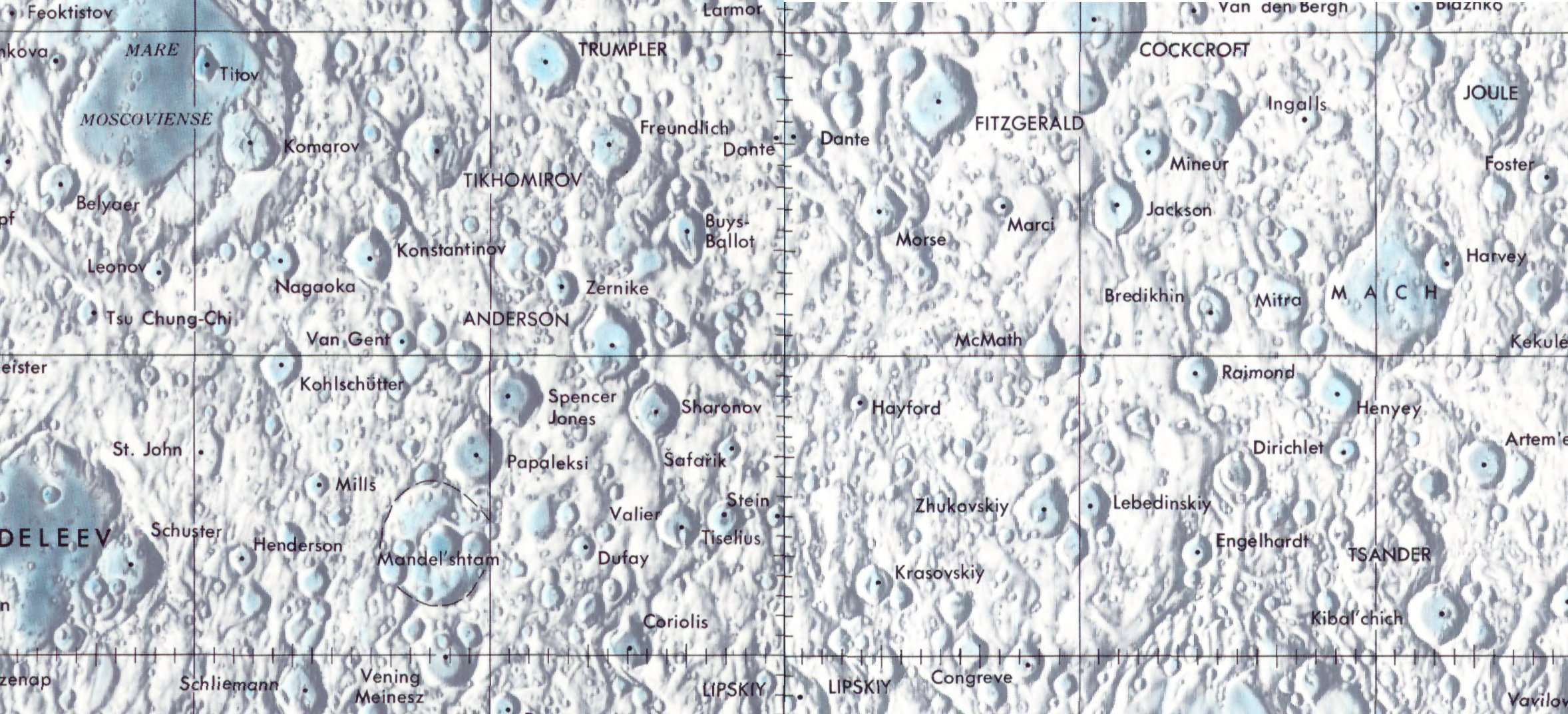 Cráter lunar Anderson. Localización. (Lunar Chart LPC1. Second Edition)